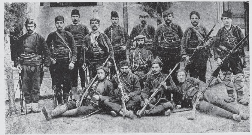 Четата на Борис Илиев